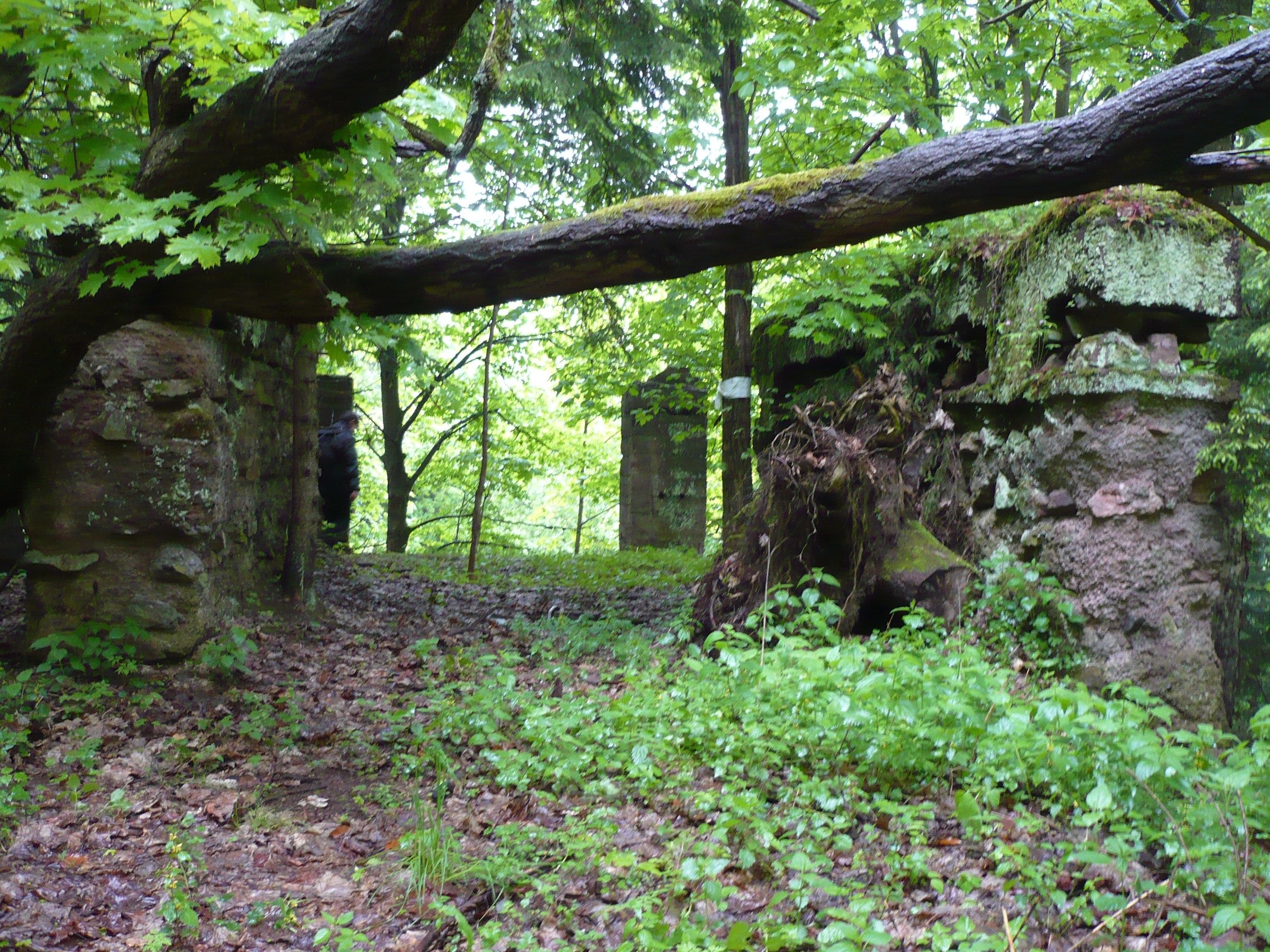 Włodzicka Góra. Obiekt do załadunku kamienia